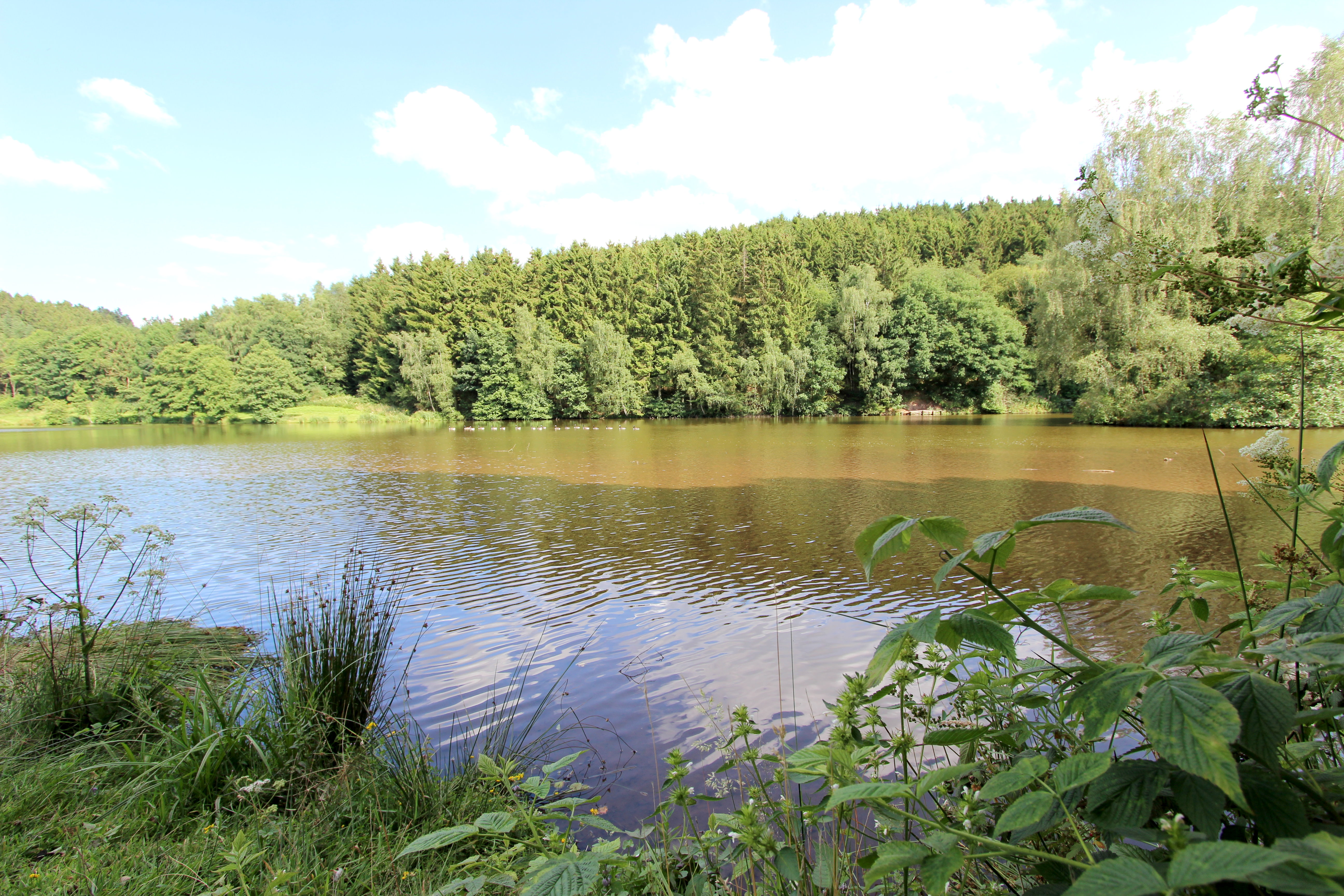 54597 Auw bei Prüm. Aufnahme von 2017.